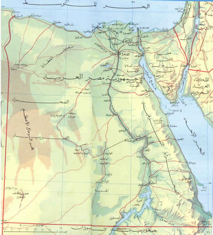 خريطة توضح حدود مصر الجغرافية والمدن الر ئيسية بها